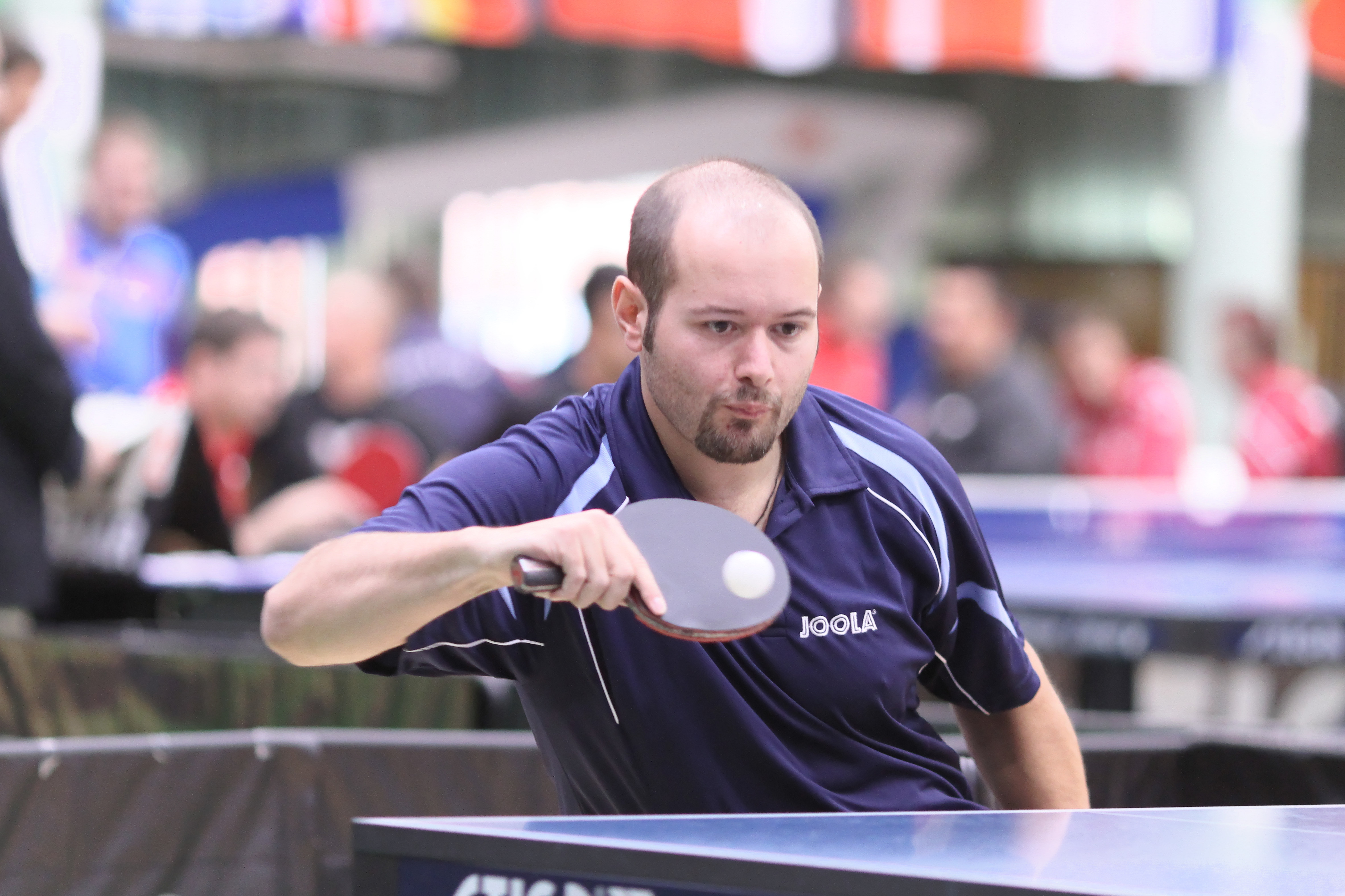 THOMAS Maxime (FRA) IMG_6027_DxO